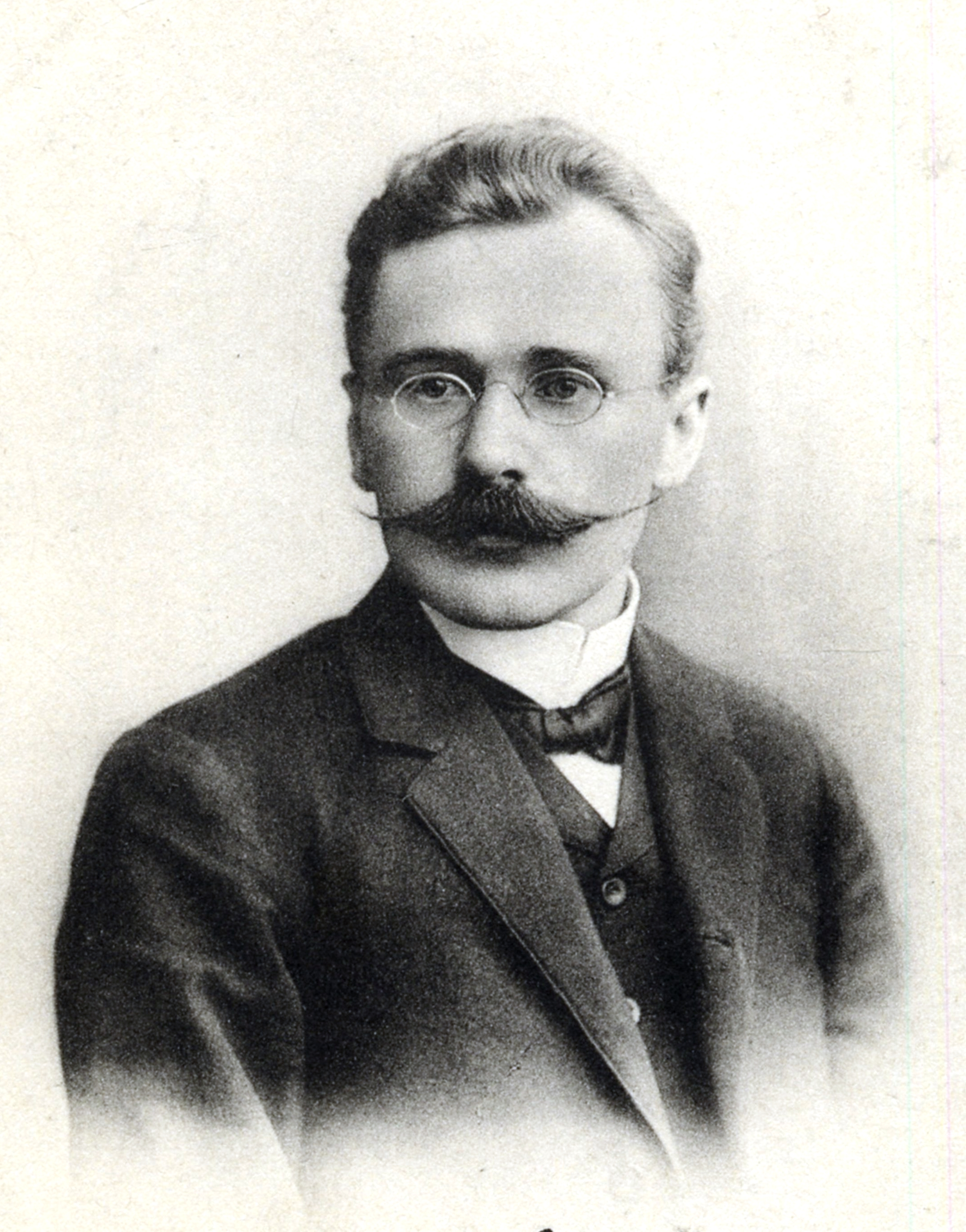 Кубилис, Иосиф Иосифович